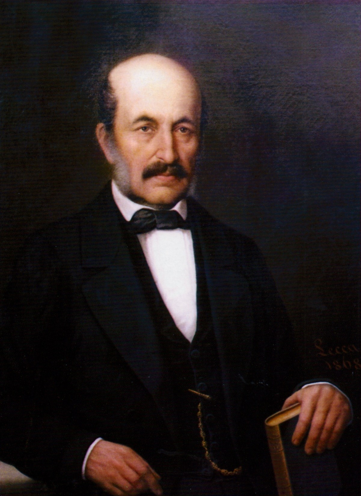 Portretul lui Petrache Poenaru, Muzeul Municipal București